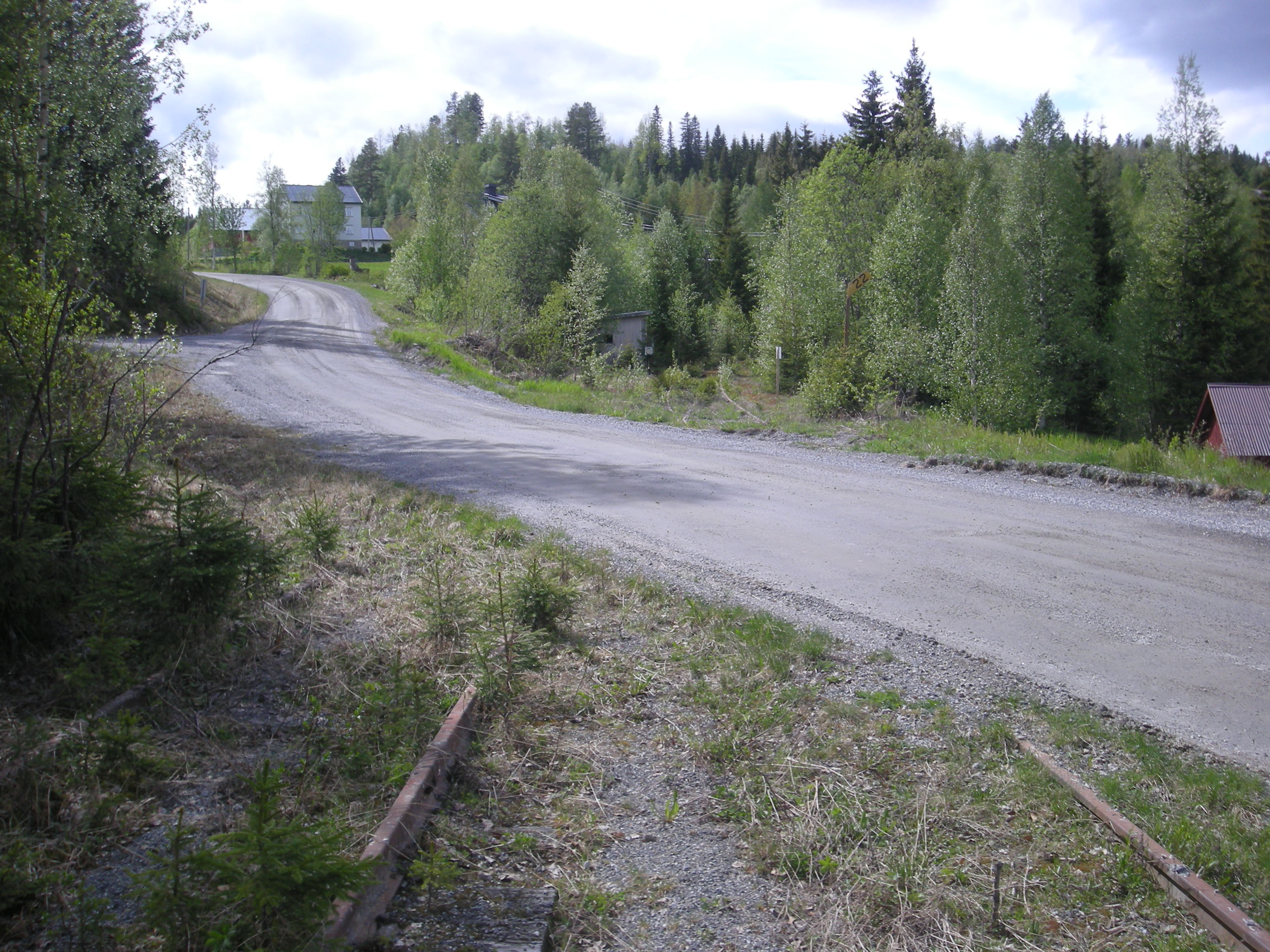 Leirskogvegen (fylkesvei 2464, tidl. 234) krysser Valdresbanen ved Etna stasjon.